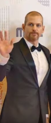 29일 오후 서울시 마포구 상암동 MBC 미디어센터 공개홀에서 '2018 MBC 방송연예대상' 레드카펫 행사가 열려 진짜사나이 300팀 매튜 감스트 안현수 주이 김재화 박재민 조현 이 포토월에서 포즈를 취하고 있다.